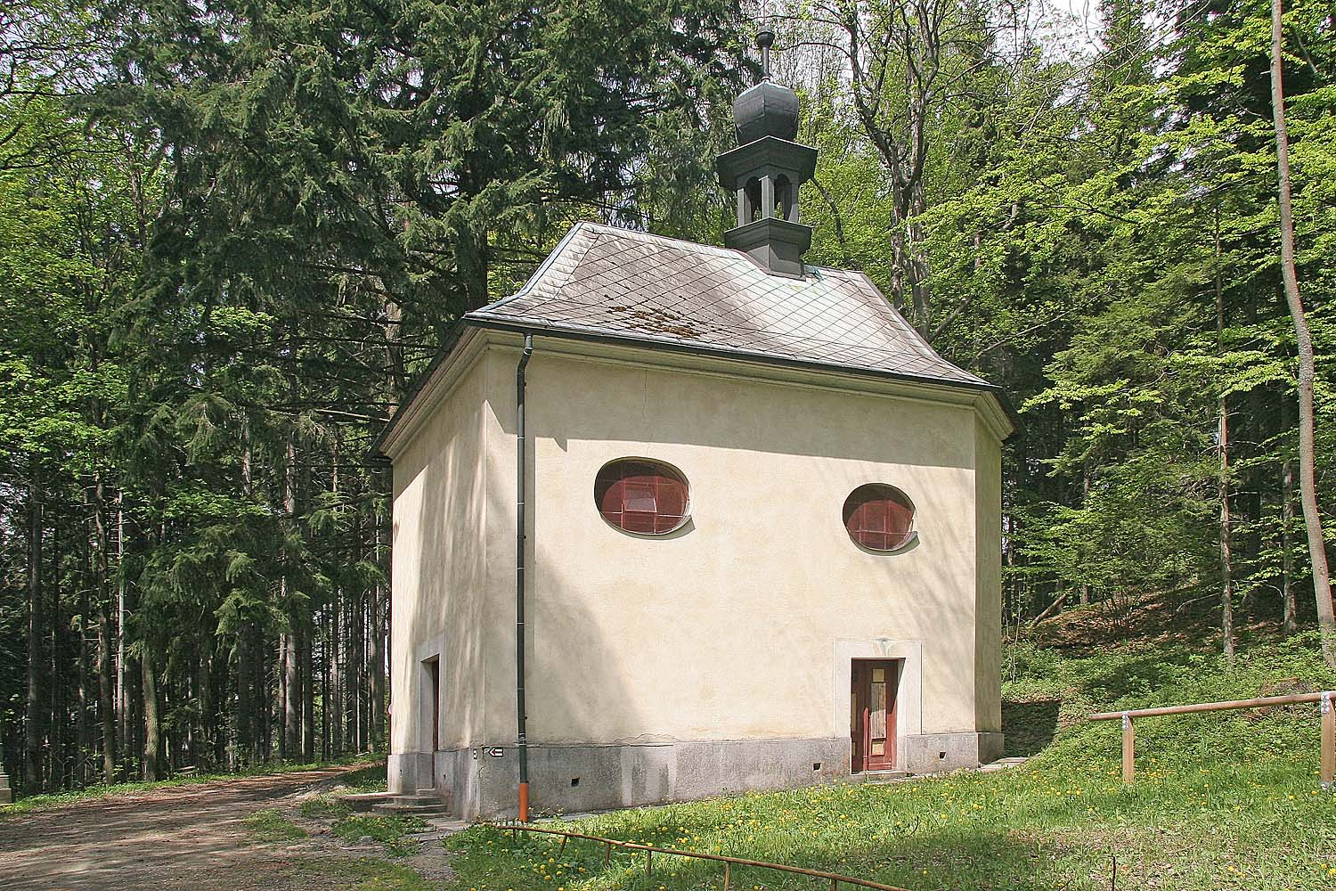 Poutní kaple Panny Marie Sněžné v bývalých lázních Balda (samy lázně leží na katstru obce Stašov, kaple již na katastru obce Jedlová, vše okres Svitavy)